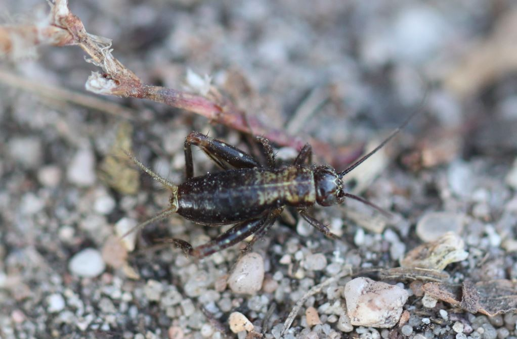 Nymphe der Waldgrille (Nemobius sylvestris) am 8. Oktober 2018 in der Schwetzinger Hardt